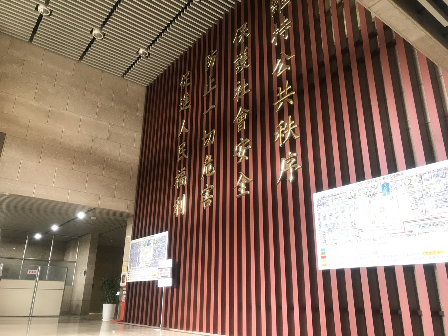 中文（台灣）: 臺中市政府警察局總局2020年新廈一樓大廳。